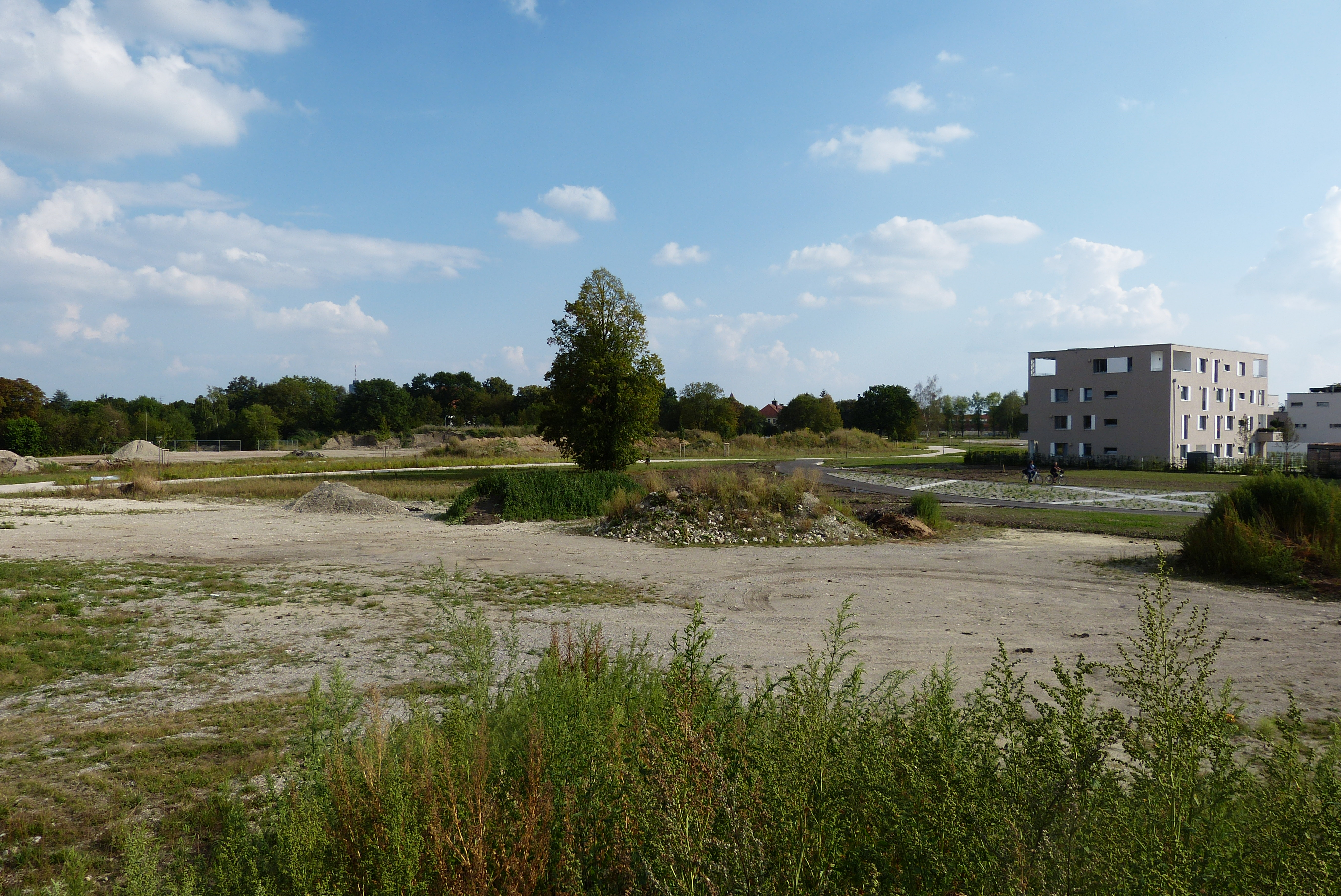 Der Reese-Park in Augsburg-Kriegshaber (im Entstehen)